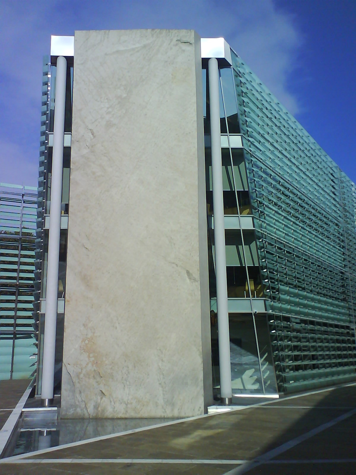 Nordische Botschaften Berlin